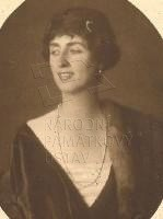 Clam-Gallas Eleonore